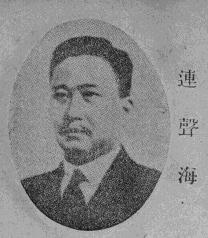 連聲海肖像